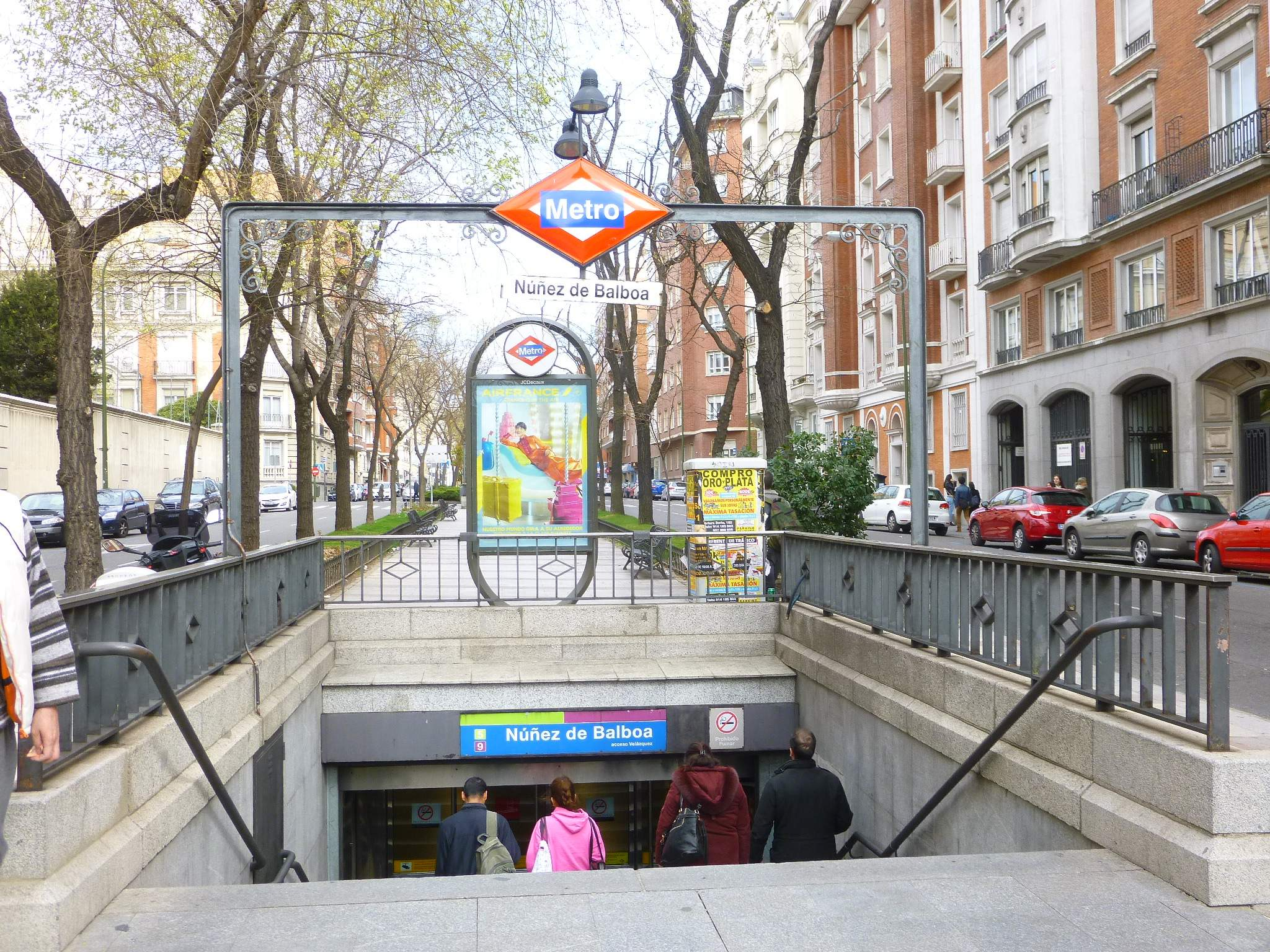 Madrid - Estación de Núñez de Balboa